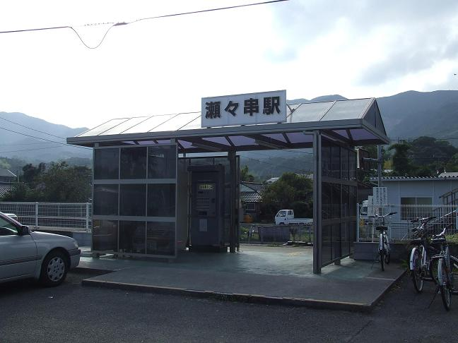 JR瀬々串駅の駅舎写真